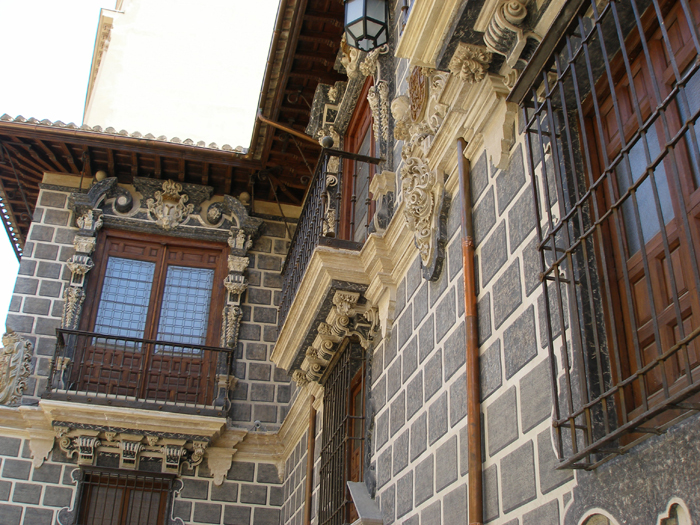 Detalle de la fachada del Palacio de la Madraza. Barroco, contiene en su interior la que fue escuela coránica nazarí. Granada, España. Façade of the Palace of the Madrassa, in Granada, Spain. Baroque style. It contains in its interior the ancient Nasrid Coranic School. (Detail).